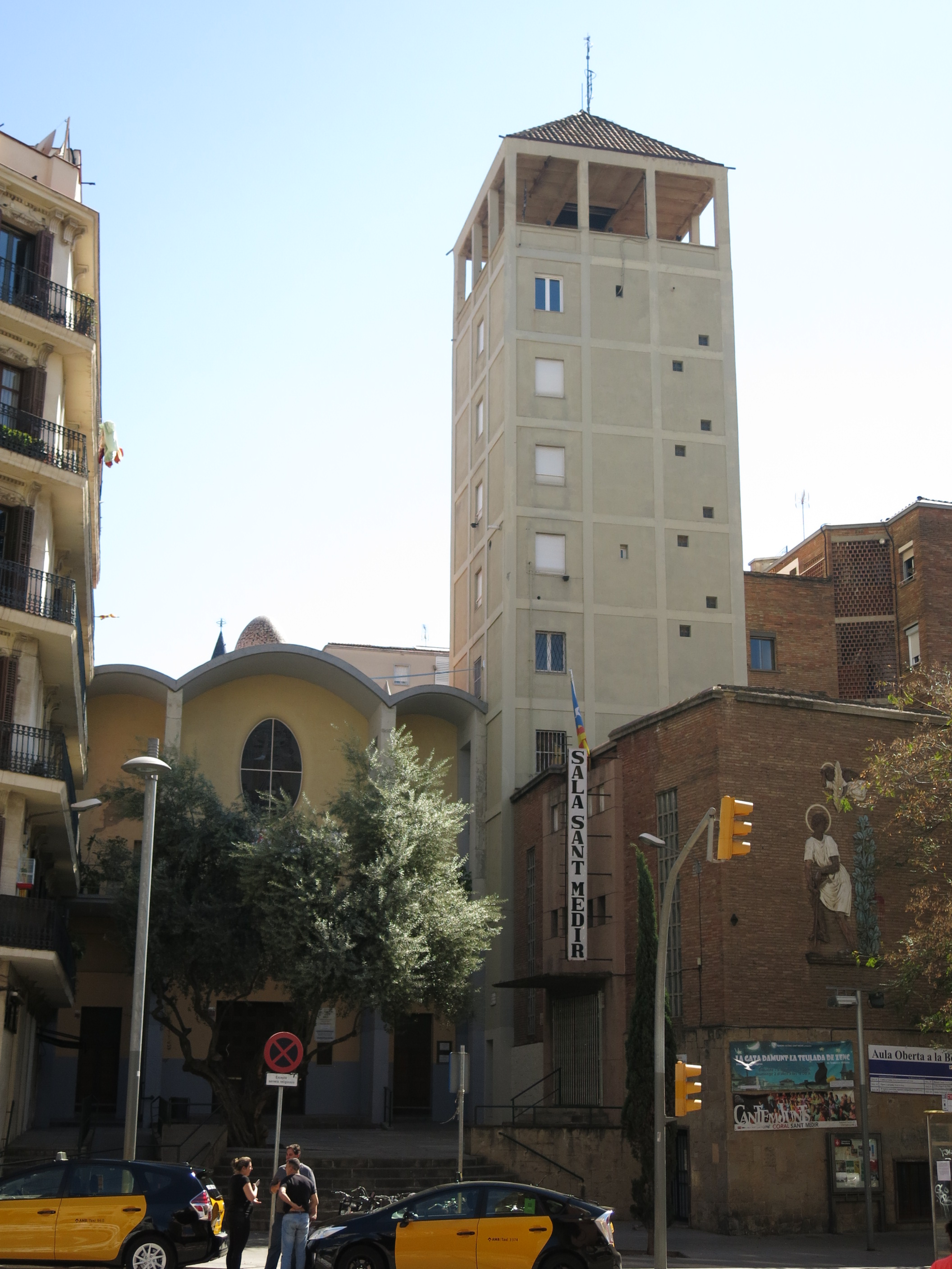 Parròquia de Sant Medir, c. Constitució 15 (Barcelona)